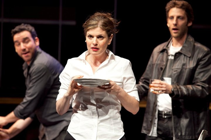 צק ברקמן, שרון שחל ומולי שולמן, במחזמר "קומפני" מאת סטיבן סונדהיים, בבימויו של רפי ניב, תיאטרון באר שבע